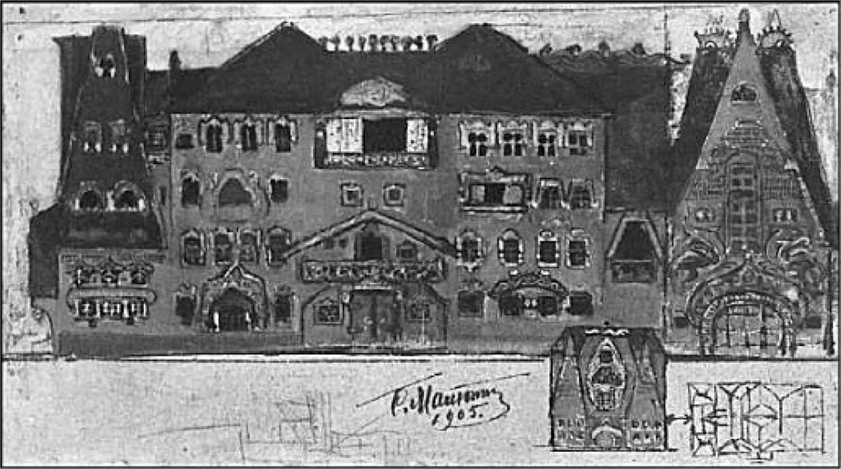 Эскиз Дома Перцовой работы Малютина.jpg